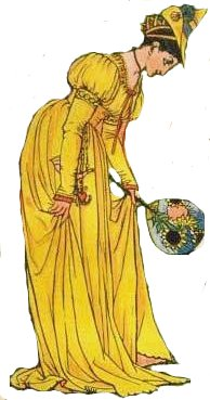 Гравюры по рисункам Крейна к сказке "Кот в Сапогах"